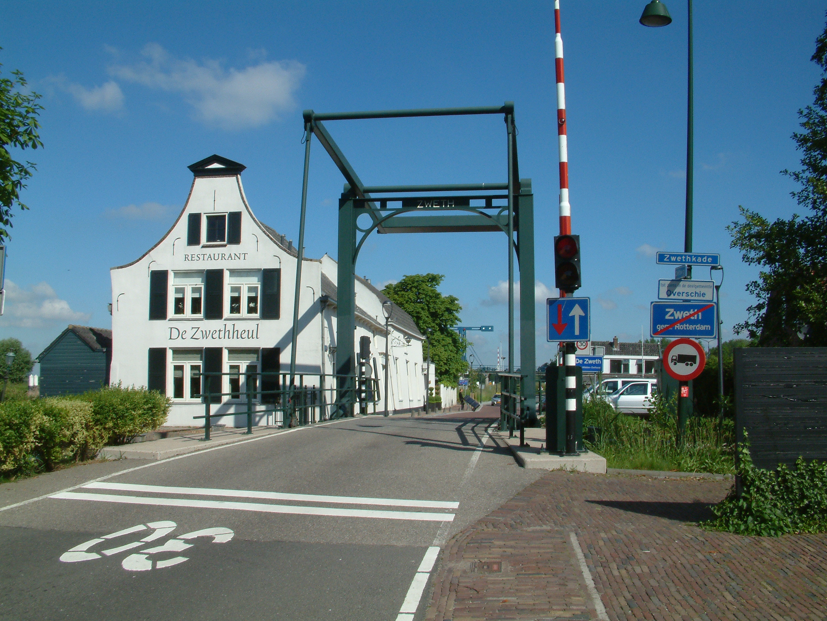 De Zweth tussen Rotterdam en Delft